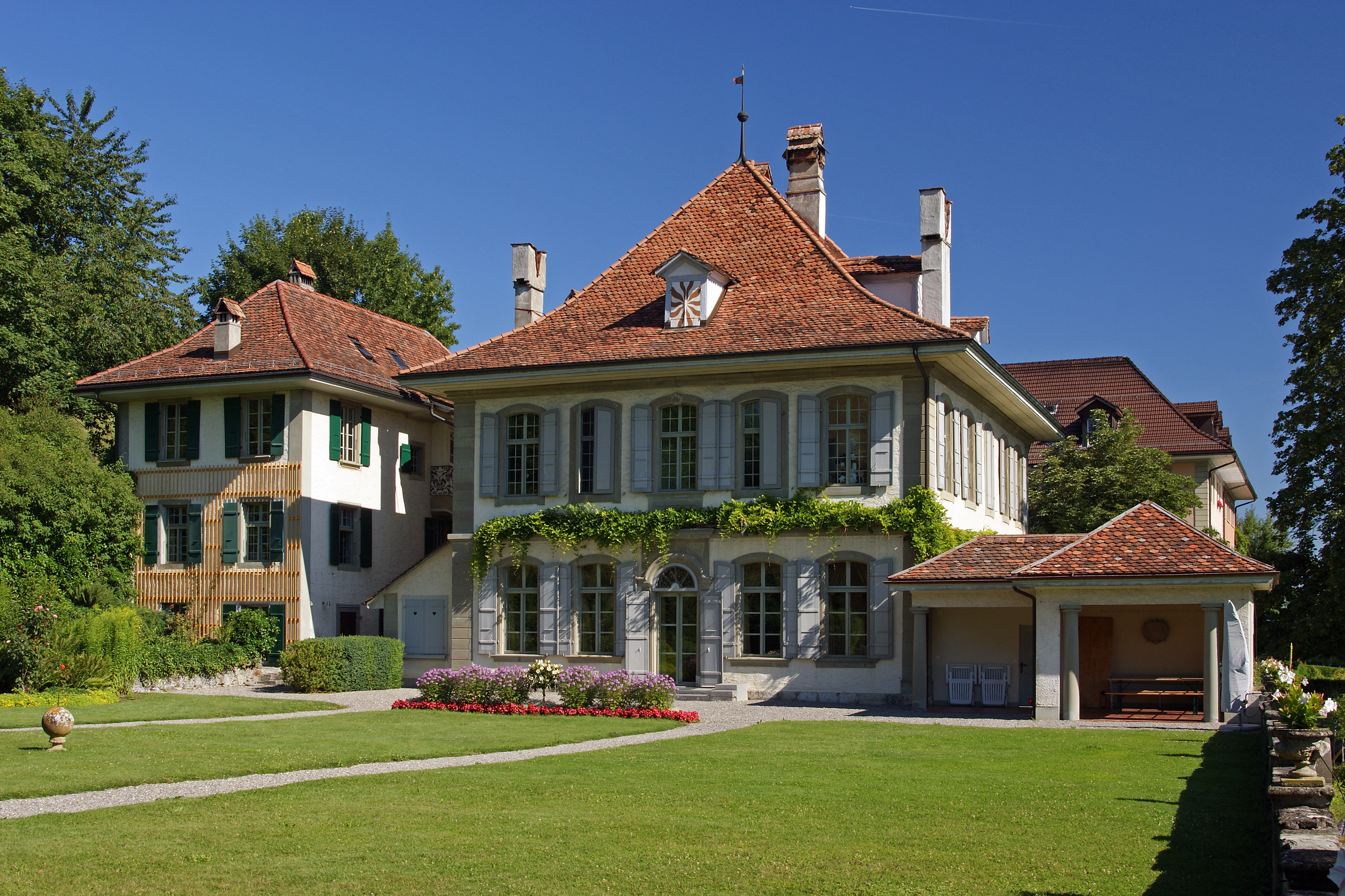 Campagne Oberried, Belp, Kt. Bern, Schweiz